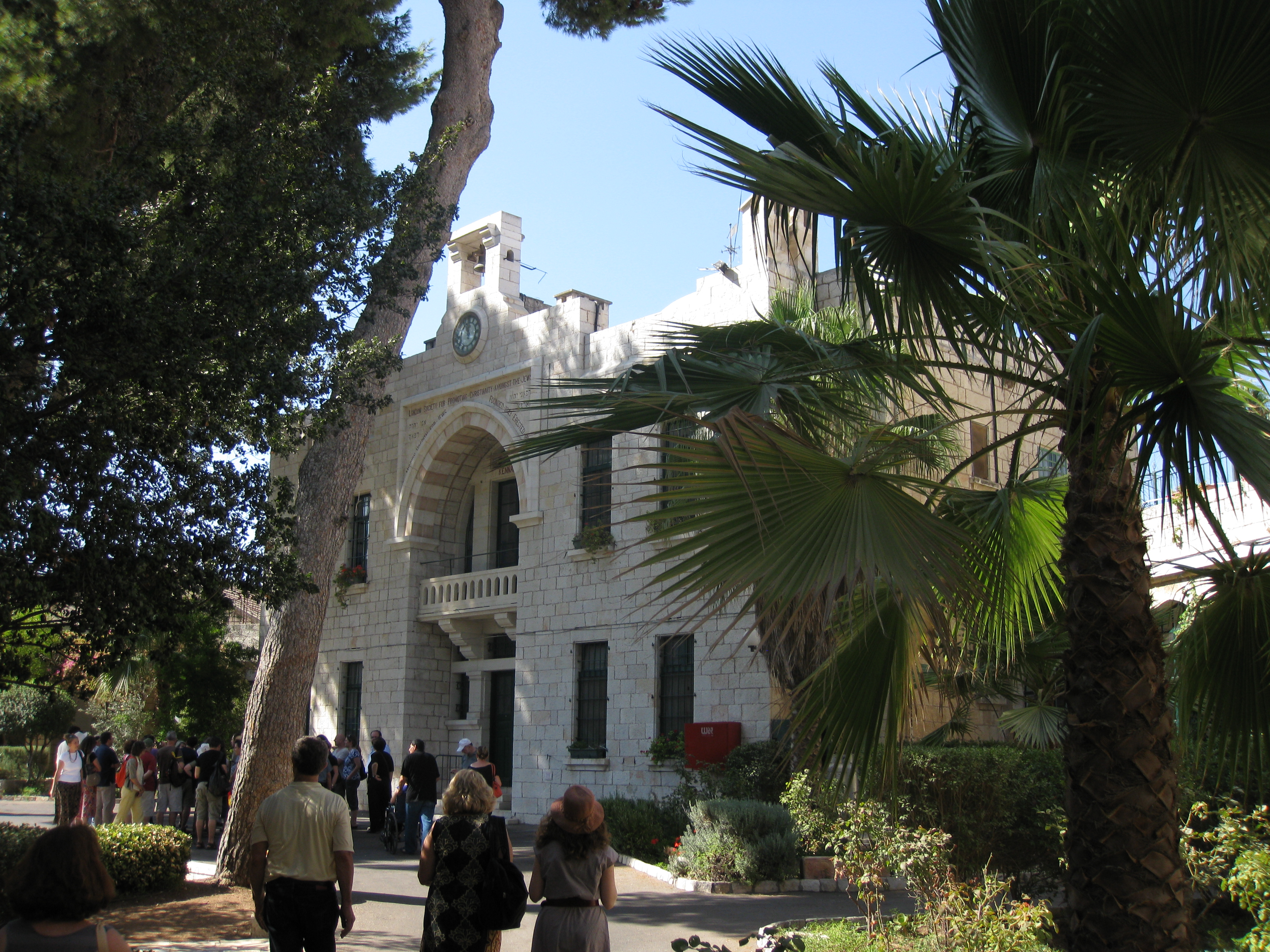 English Mission Hospital בית החולים של המיסיון האנגלי